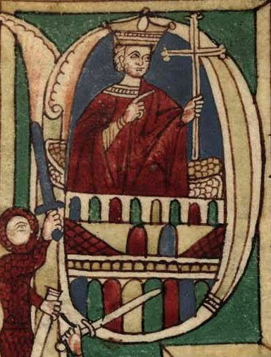 Don Pelayo en la batalla de Covadonga. Detalle del folio 23 recto del manuscrito 2805 de la Biblioteca Nacional de España.